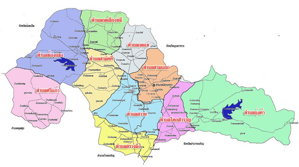 แผนที่อำเภอเลิงนกทา-สำนักงานพัฒนาชุมชน